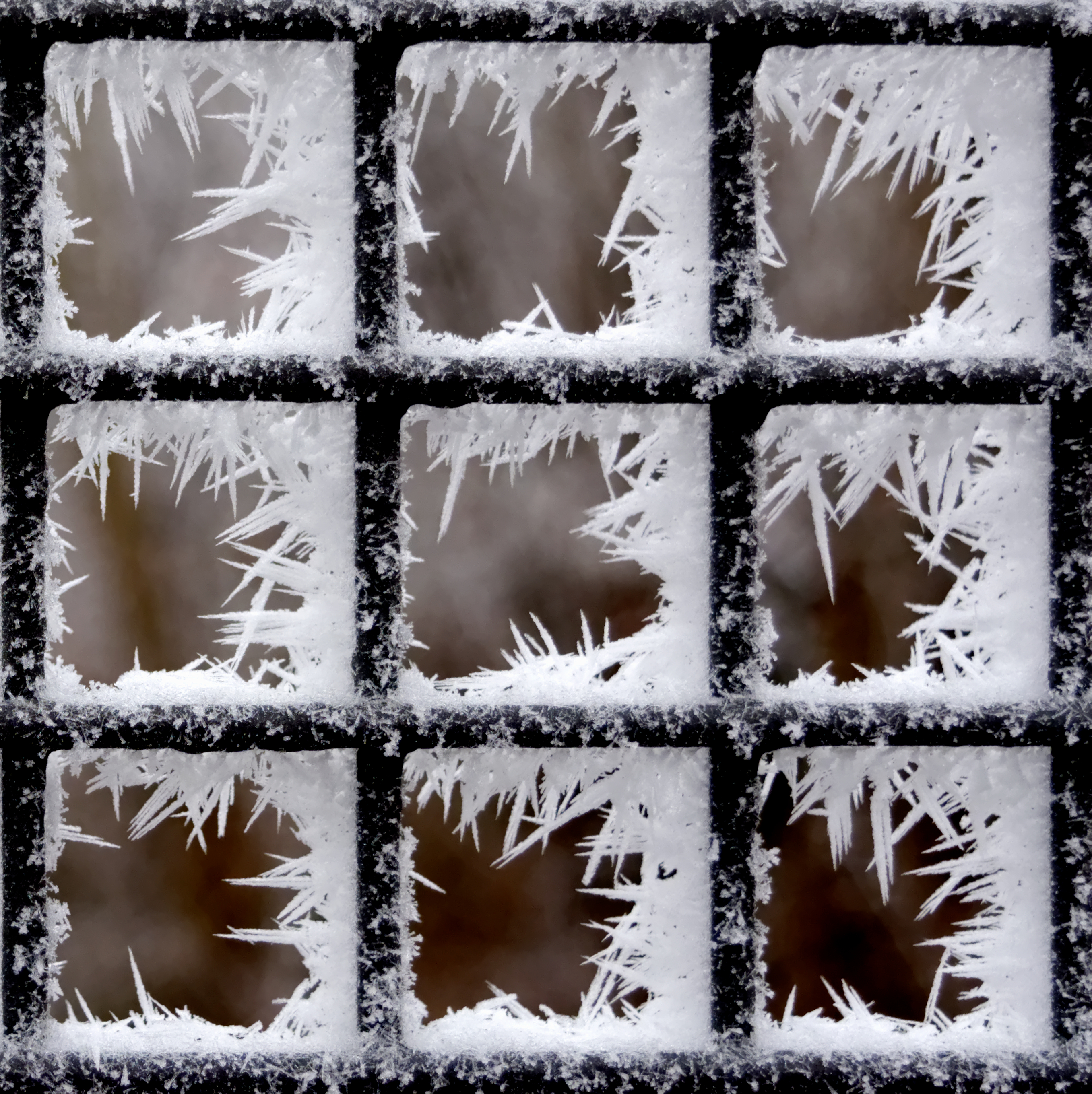 Frost